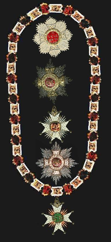 Sterren en kruisen uit mijn eigen verzameling in een fotomontage.